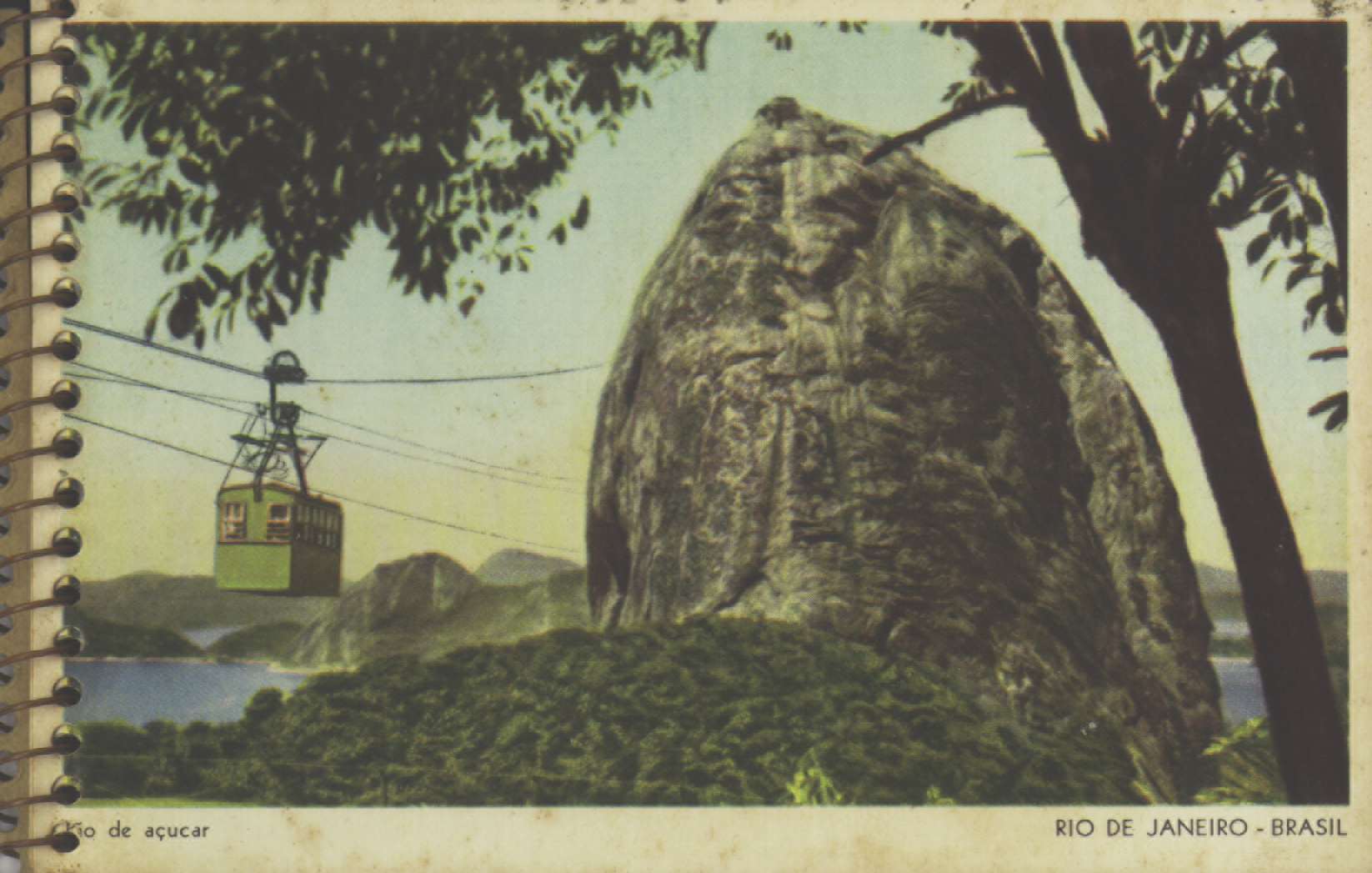 Obra que integra o acervo do Museu Paulista da USP. Coleção Werner Haberkorn